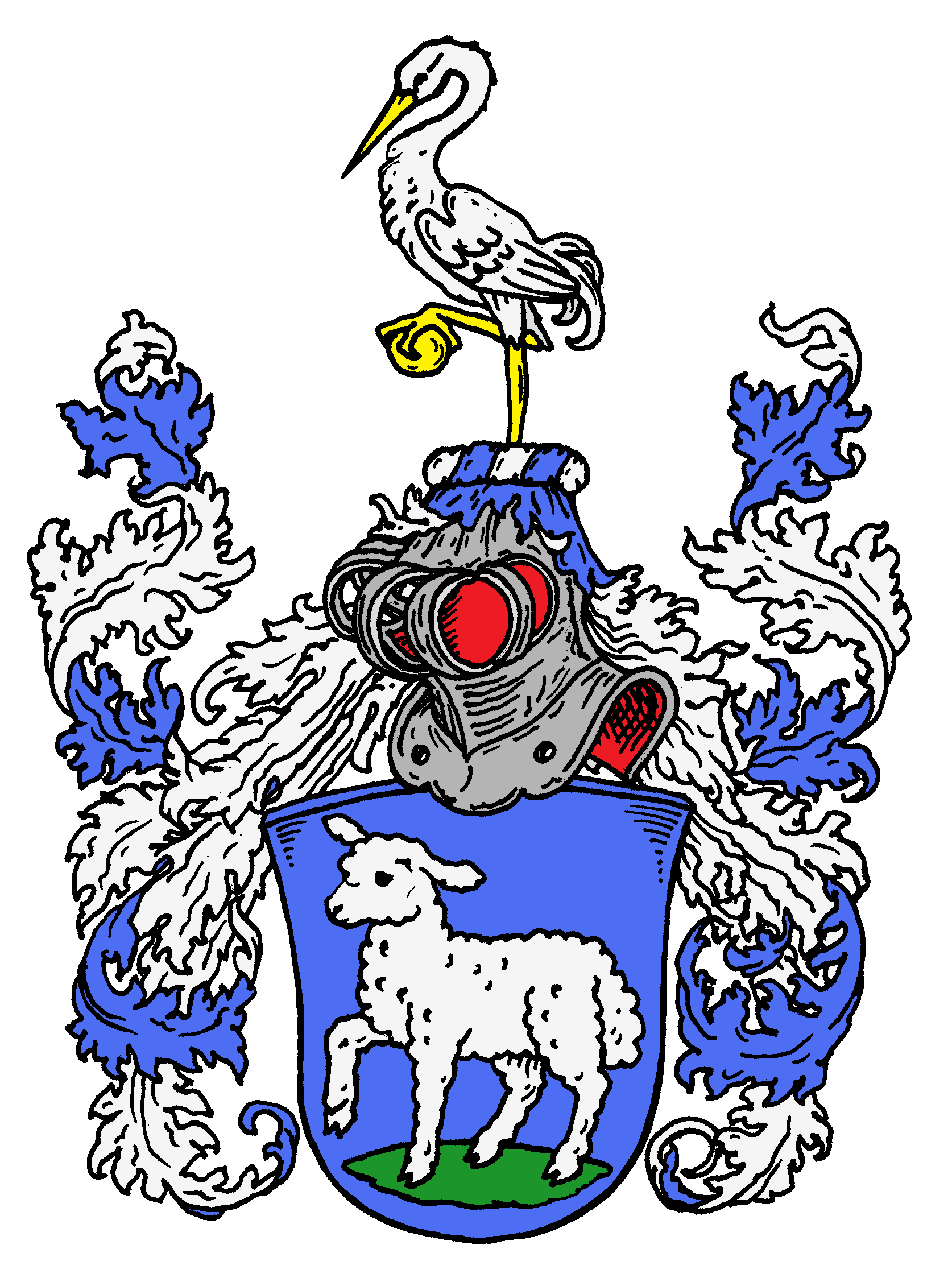 Wappen der (von) Ribbentrop, altes lippisch-braunschweigisches Geschlecht, später in Zweigen zum preußischen Adel gehörig